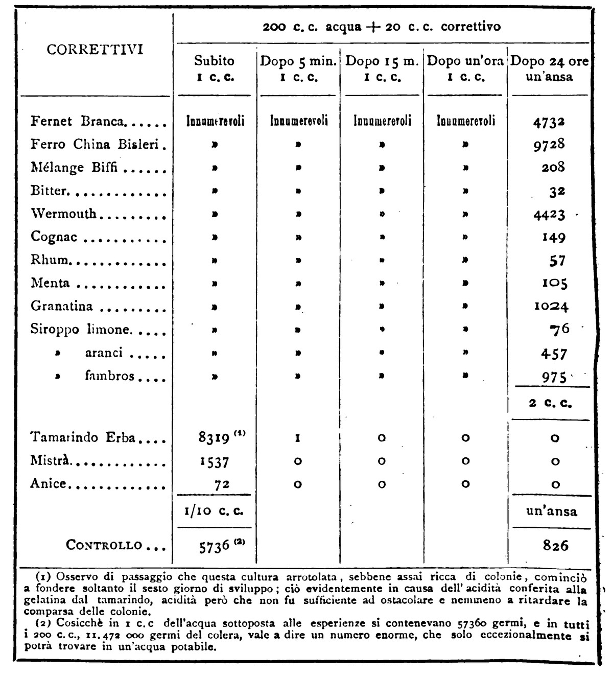 Tabella di efficacia di alcuni correttivi per la purificazione dell'acqua contro il colera